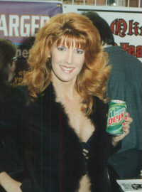 Christi Lake